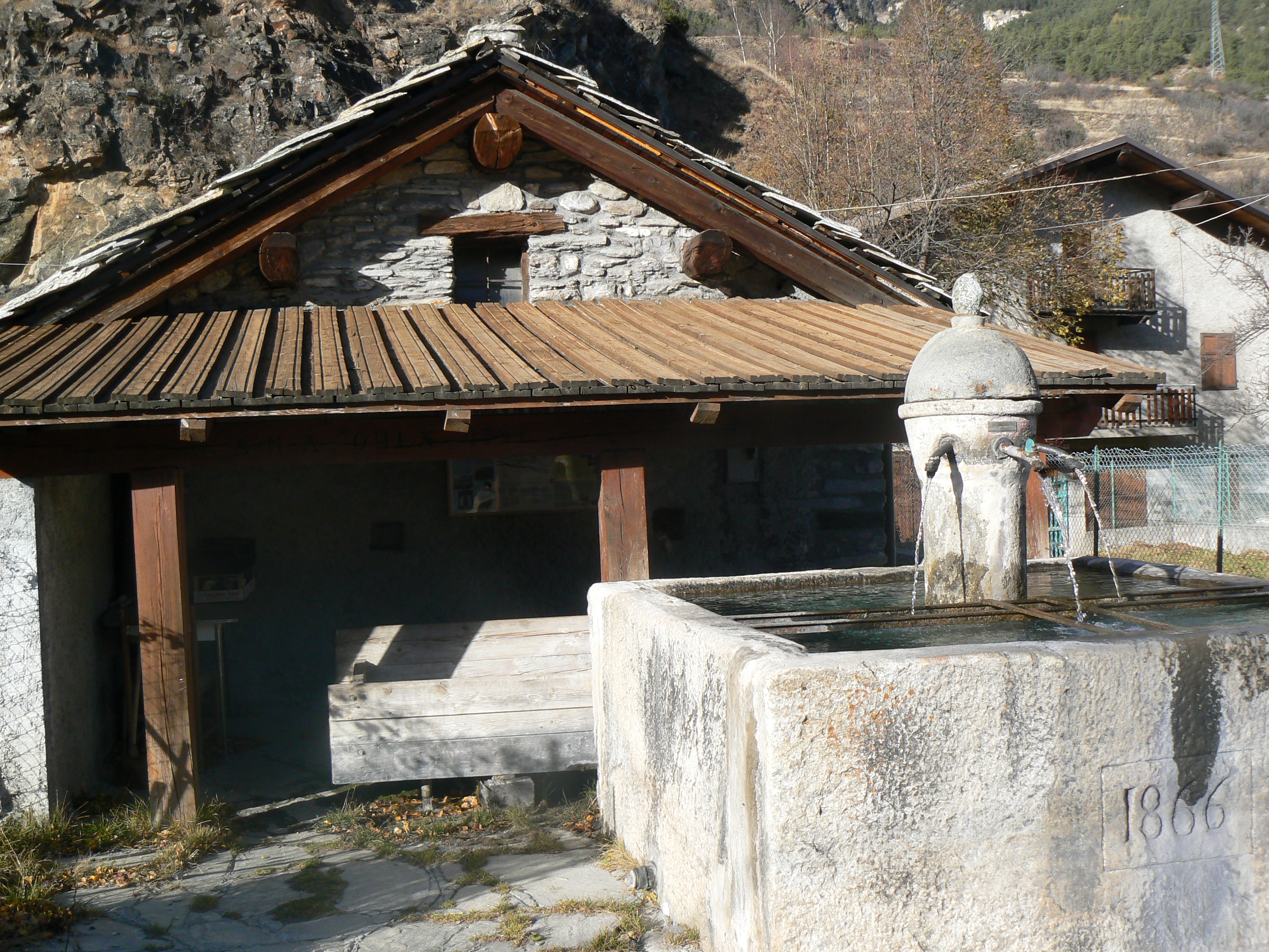 La fontana e il forno a legna di Savoulx